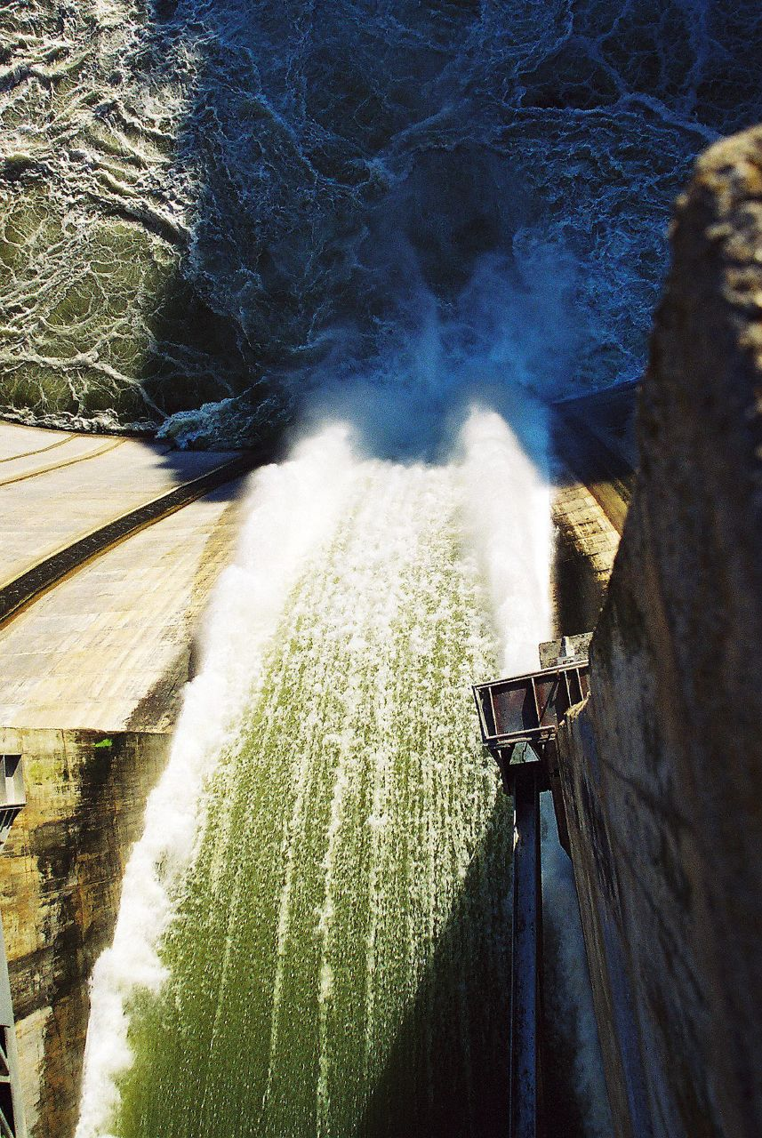 Barragem de Picote - Mogadouro